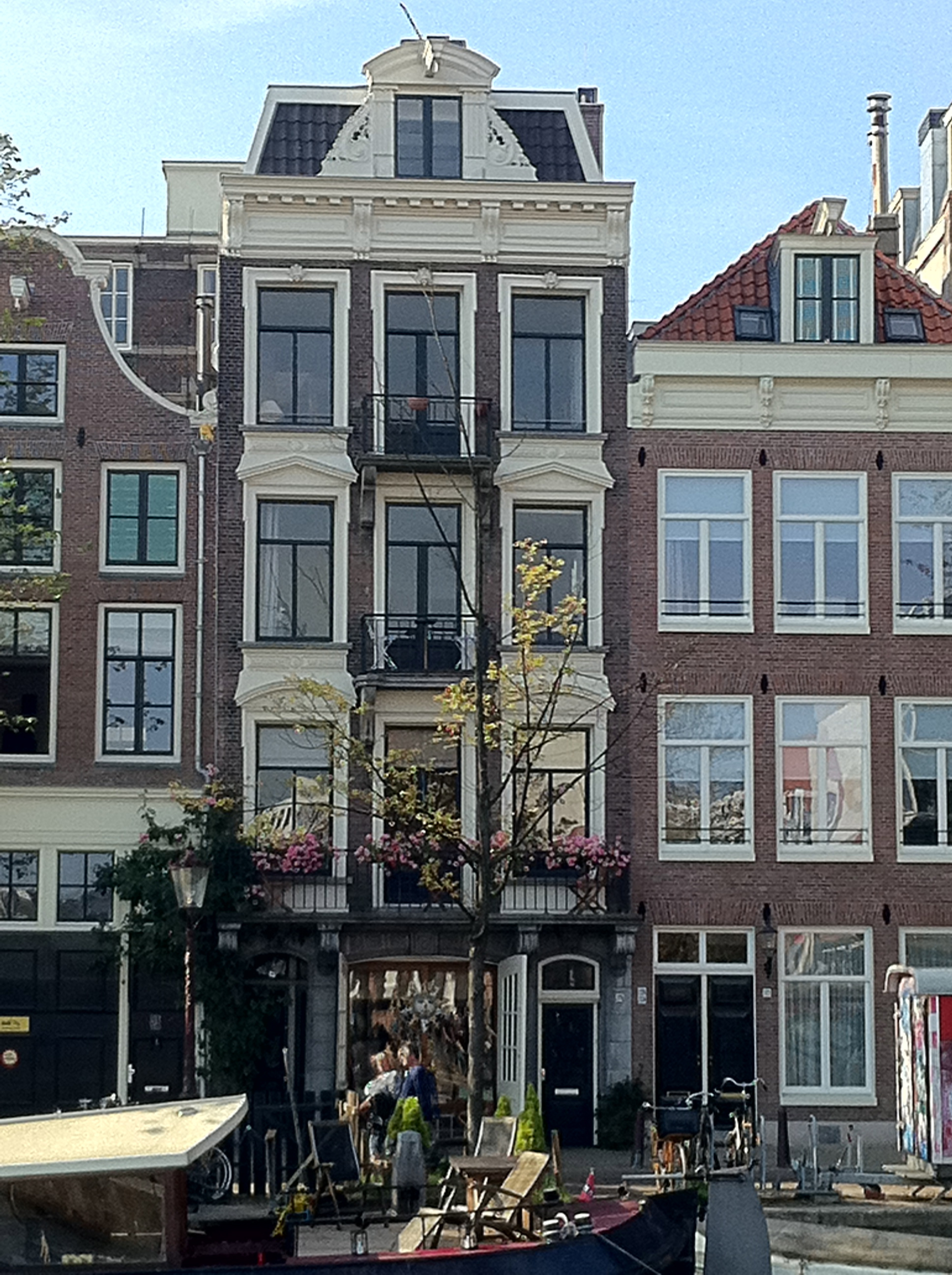 Amsterdam - Zwanenburgwal 280